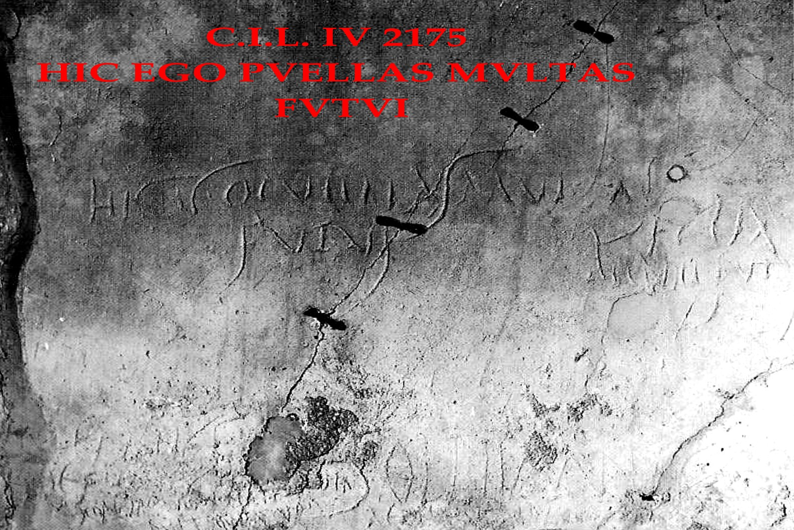 Inscripción pompeyana hic ego puellas multas futui